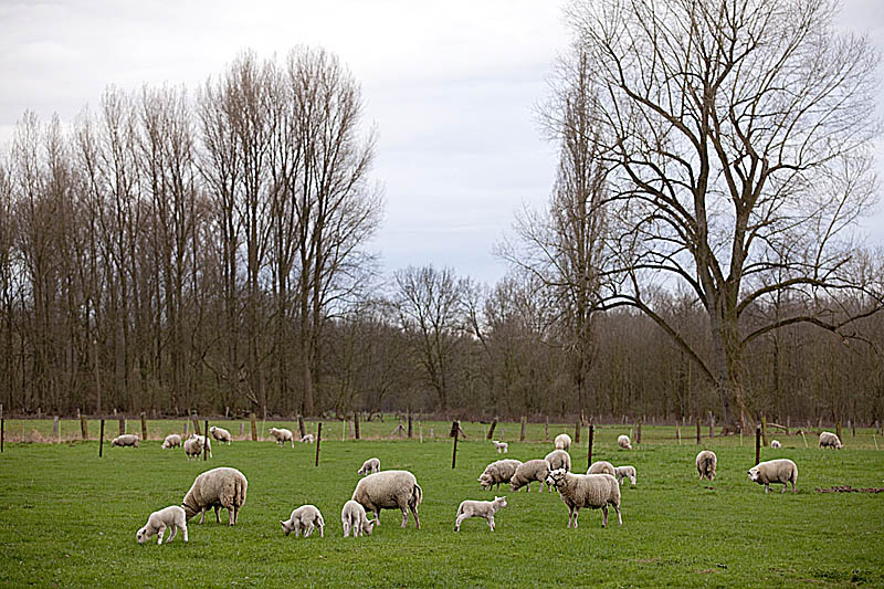 Europa, Deutschland, Nordrhein Westfalen, Niederrhein Rheinland, Krefeld, Schafe im Naturschutzgebiet Hülser Bruch (oder in der Umgebung?)